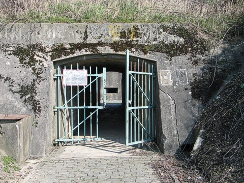 Zugangsweg von Fort Aubin-Neufchateau mit deckender MG-Scharte. Die Verteidiger haben durch das Gitter hindurch geschossen, einige Geschosse sind im Gitter hängen geblieben